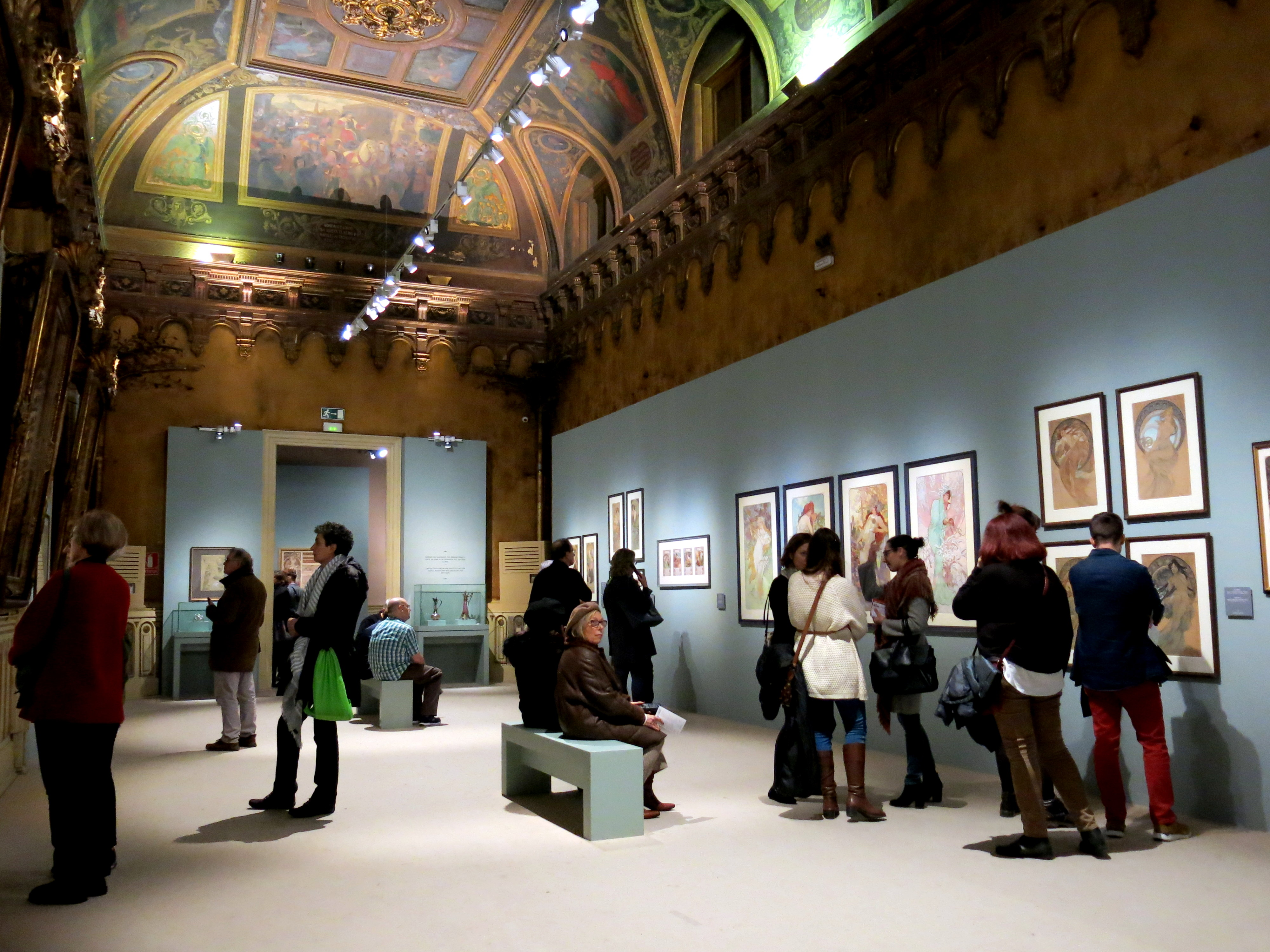 Alphonse Mucha en el Palacio de Gaviria de Madrid